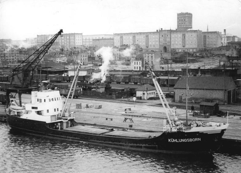 Rostock, Hafen, Frachter, Verladekran, Ruine der Jakobikirche Zentralbild Löwe 25.3.1957 Reger Betrieb im Hafen von Rostock. Das Küstenmotorschiff der Deutschen Seereederei "Kühlungsborn"ladet Kali für Plymouth und Exmonth (England). Im Hintergrund die sozialistische Straße und die Ruine der Jacobikirche.